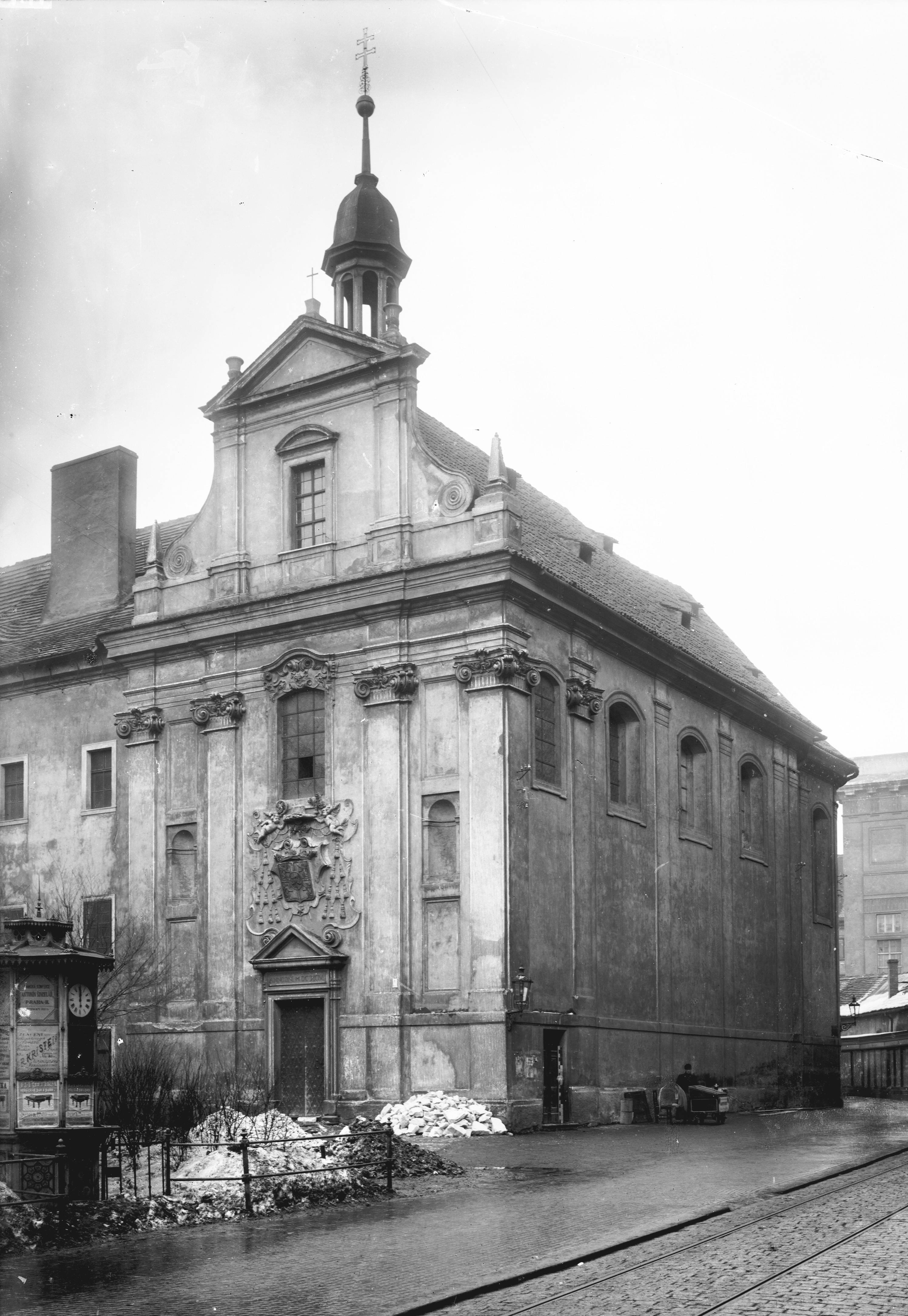 Kostel sv. Vojtěcha u Prašné brány v Praze na Starém Městě